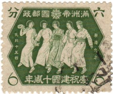 满洲国邮票。 本人收藏。